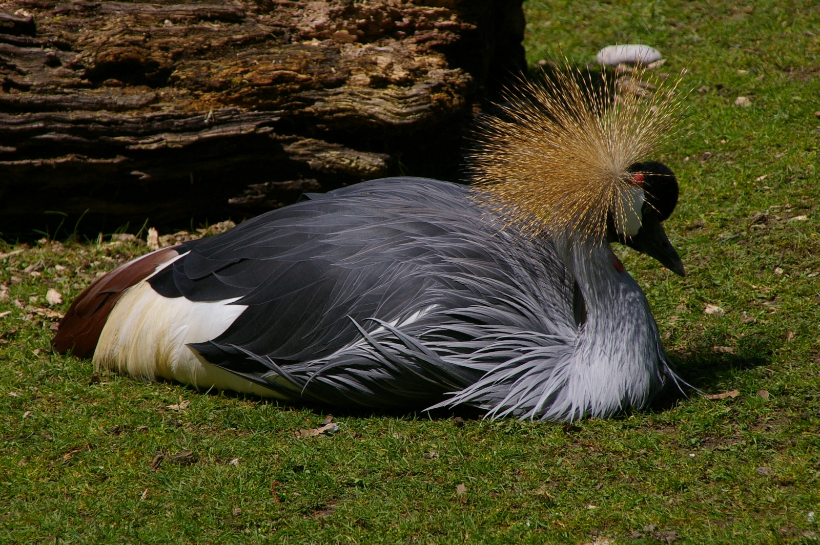 Südafrika-Kronenkranich im Münchner Zoo